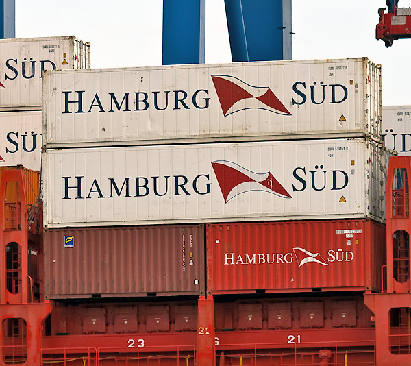 Zwei 40-Fuß-ISO-Container (jeweils 2 TEU oder 1 FEU) oben, darunter zwei 20-Fuß-ISO-Container (jeweils 1 TEU).